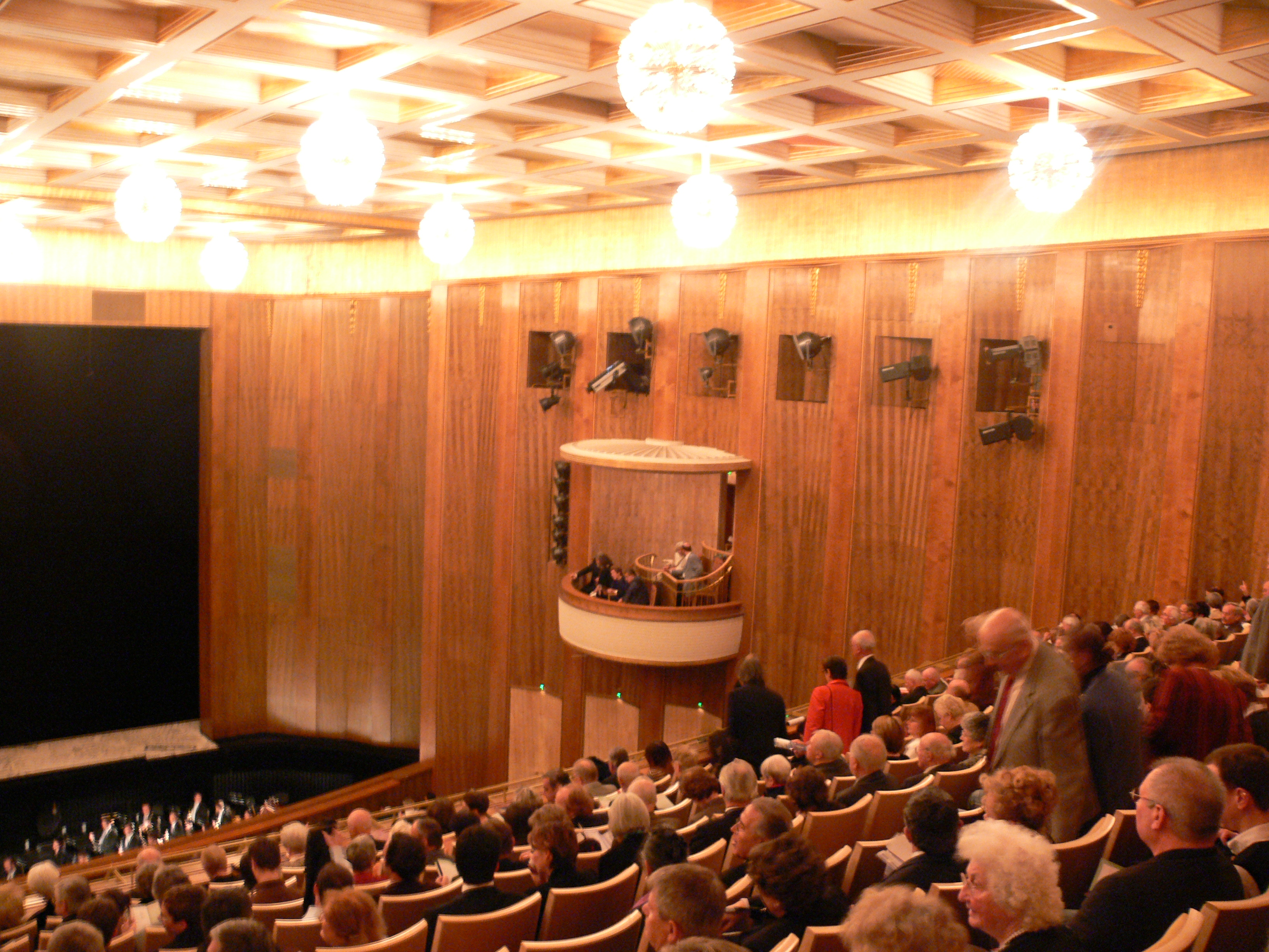 Opernhaus Leipzig, Zuschauerraum